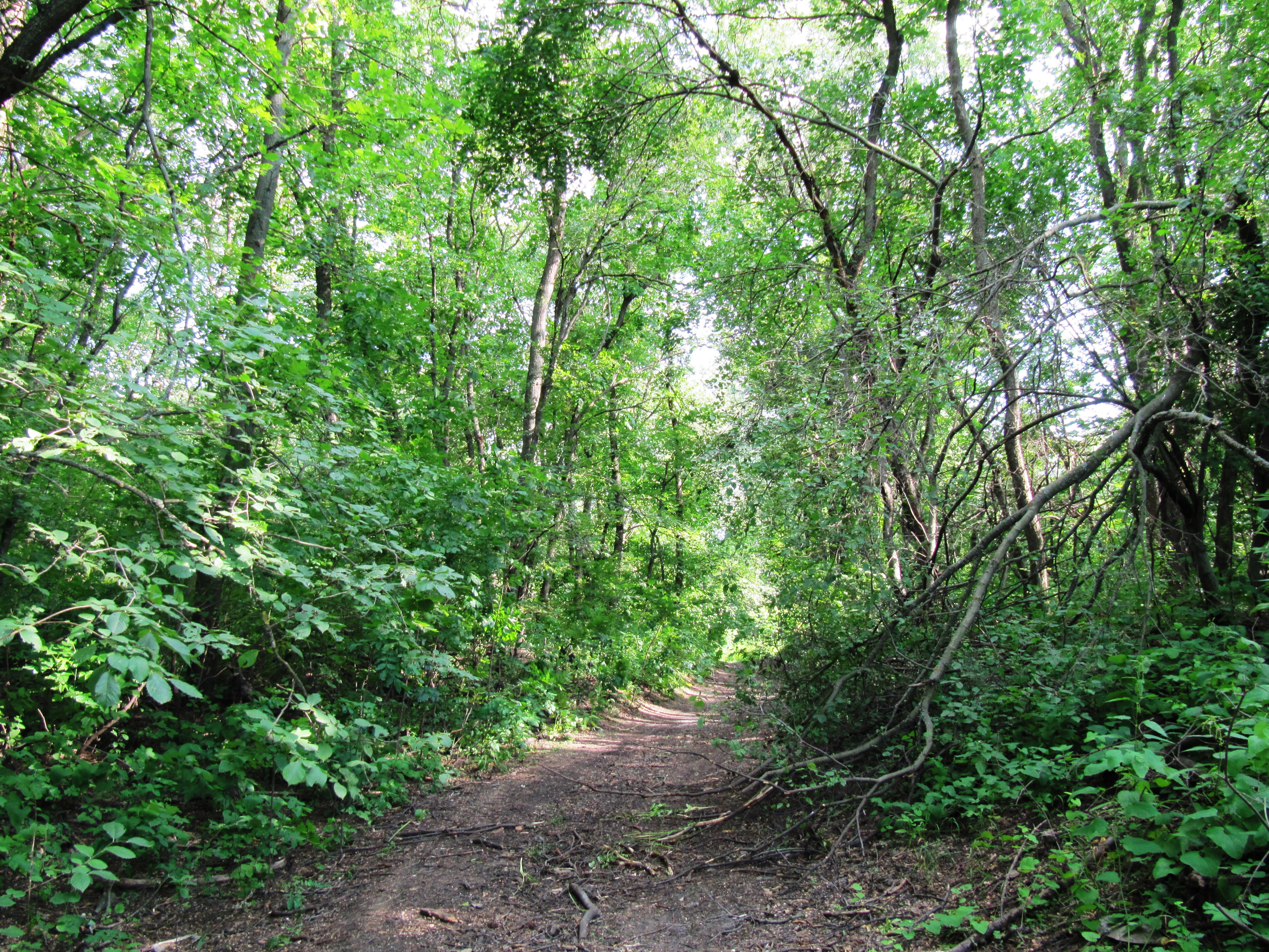 Пойменная дубрава.